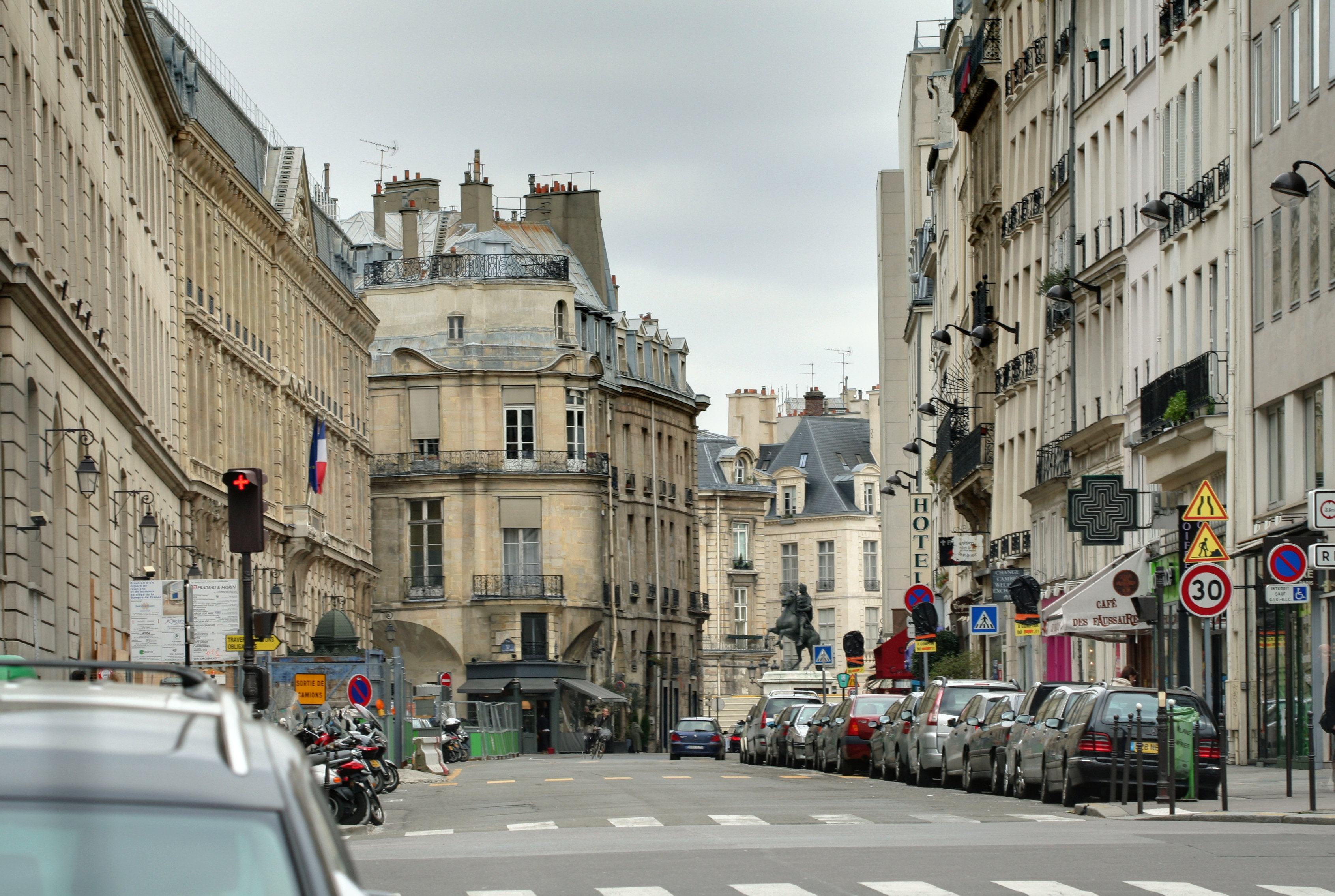 Vue de la rue Croix-des-Petits-Champs, Paris 1er, place des Victoires et hôtel Portalis au fond. This image was created with Hugin.